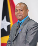 Noé da Silva Ximenes, Abgeordneter des Nationalparlaments Osttimors